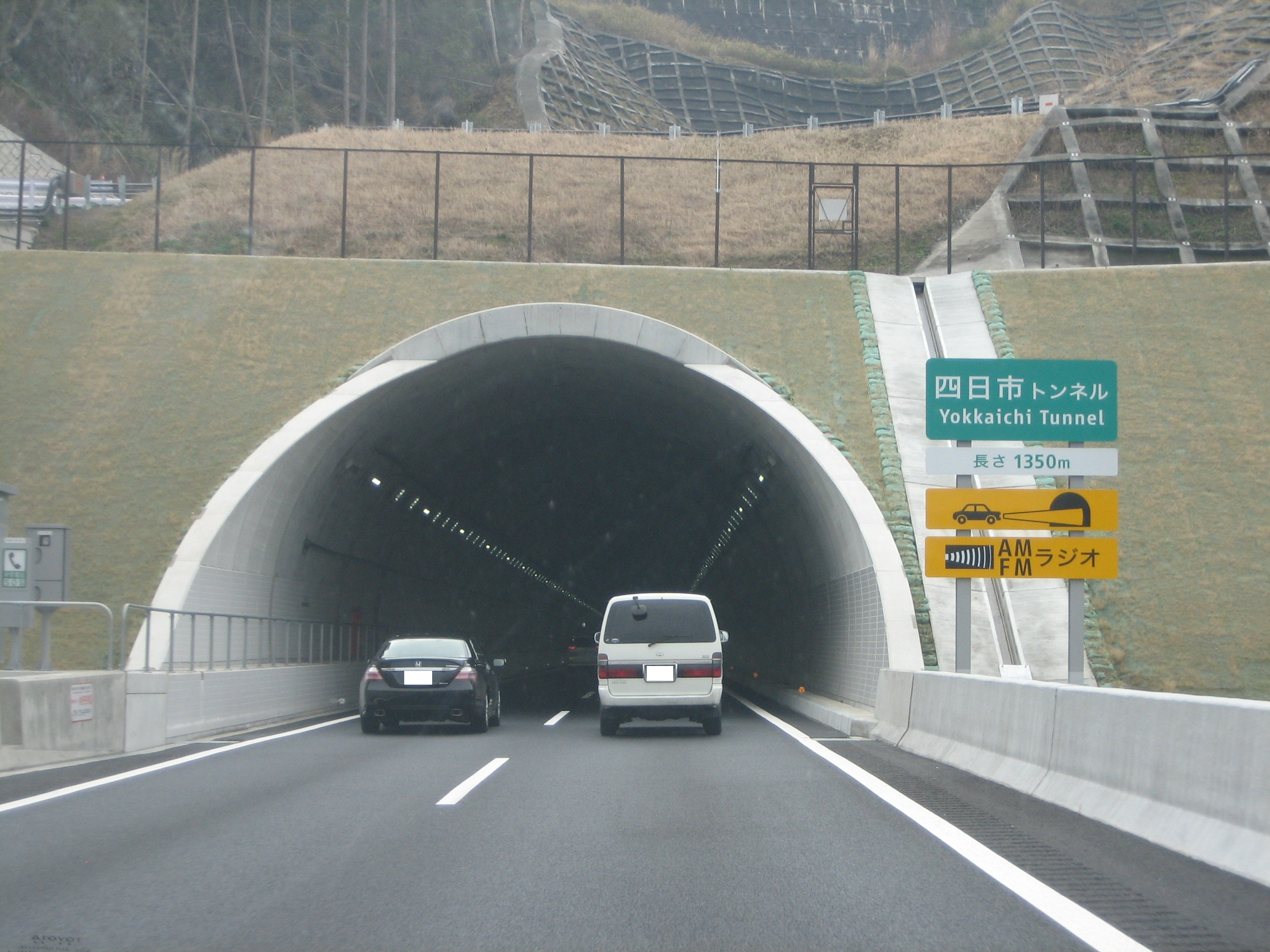 四日市トンネル入口